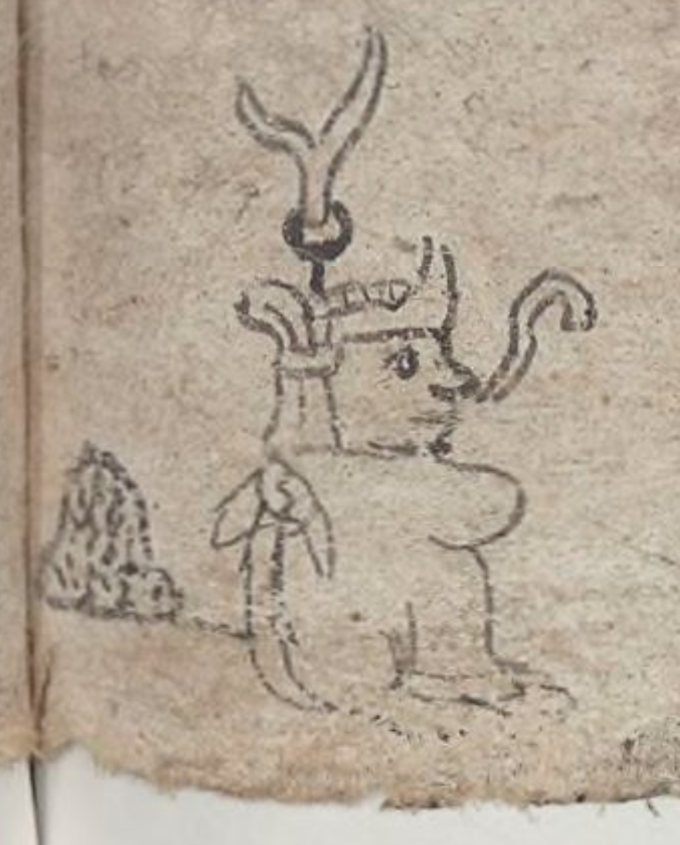 Representación de Cuacuauhpitzahuac, gobernante de Tlatelolco en el Códice mexicanus, BnF. 23-24